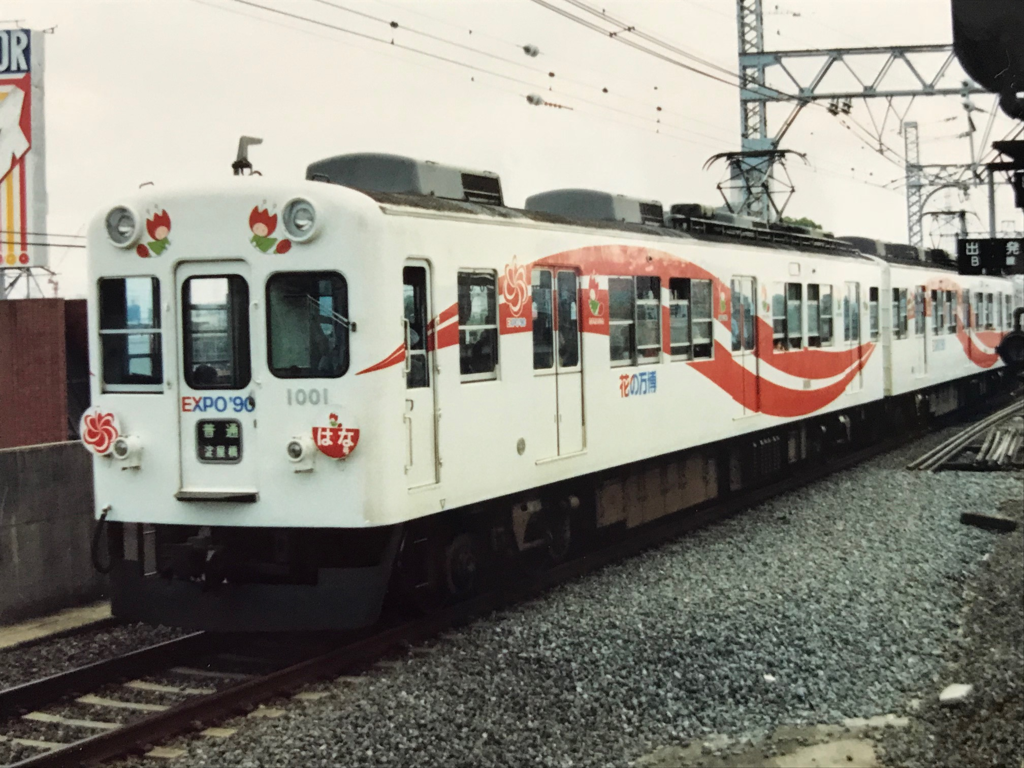 1000系